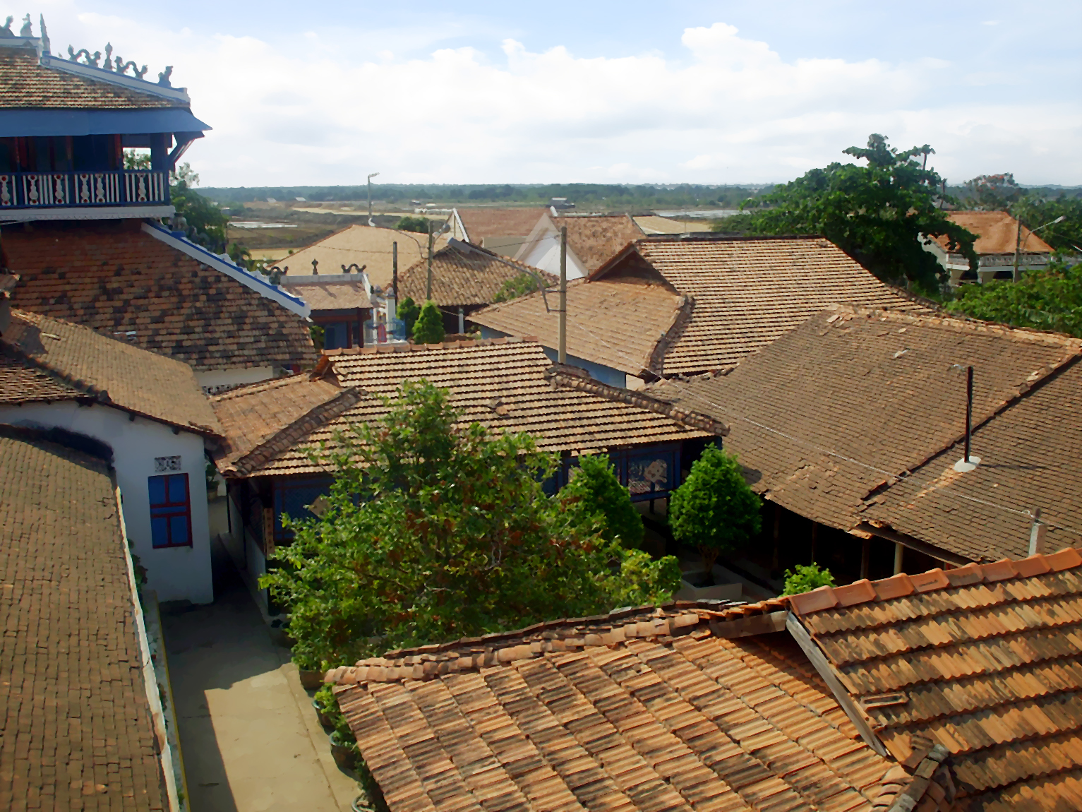 Một phần Nhà lớn Long Sơn (Vũng Tàu, Việt Nam) khi nhìn từ trên cao.